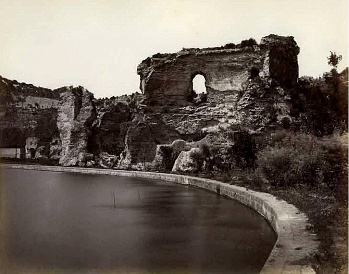 Pozzuoli - Tempio di Apollo sul Lago d'Averno. Autore sconosciuto.